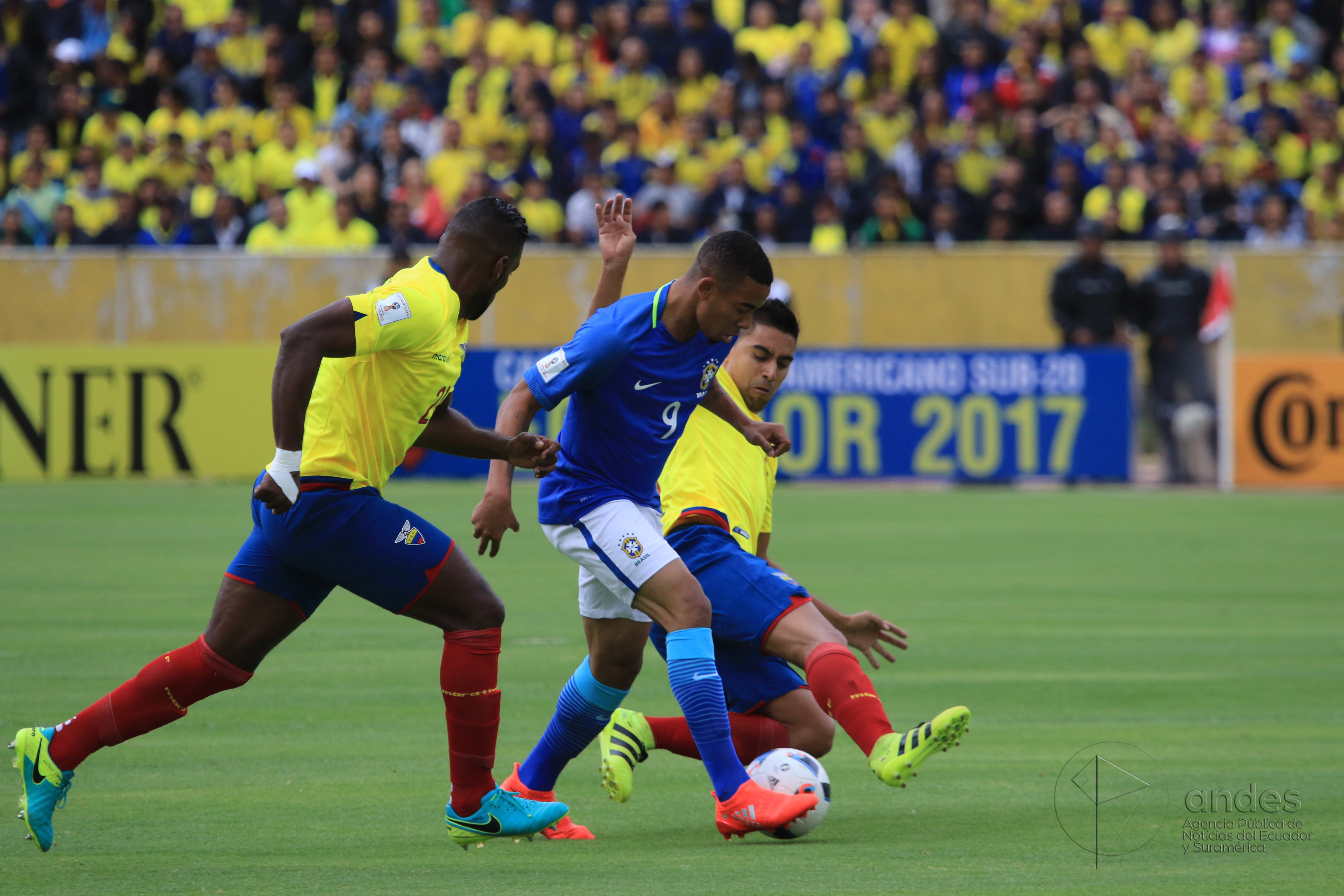 Quito 01 Sep (Andes).- Imágenes del encuentro entre Ecuador y Brasil por las eliminatorias al mundial Russia 2018. El resultado del encuentro terminó en 3 a 0 a favor del equipo garoto. Fotografías: Carlos Rodríguez/Andes.